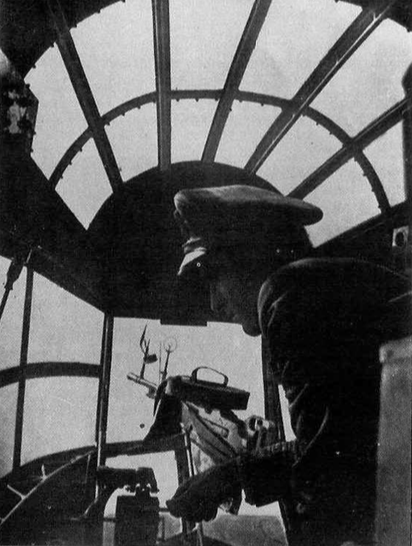 Savoia Marchetti SM.79 B postazione mitragliere